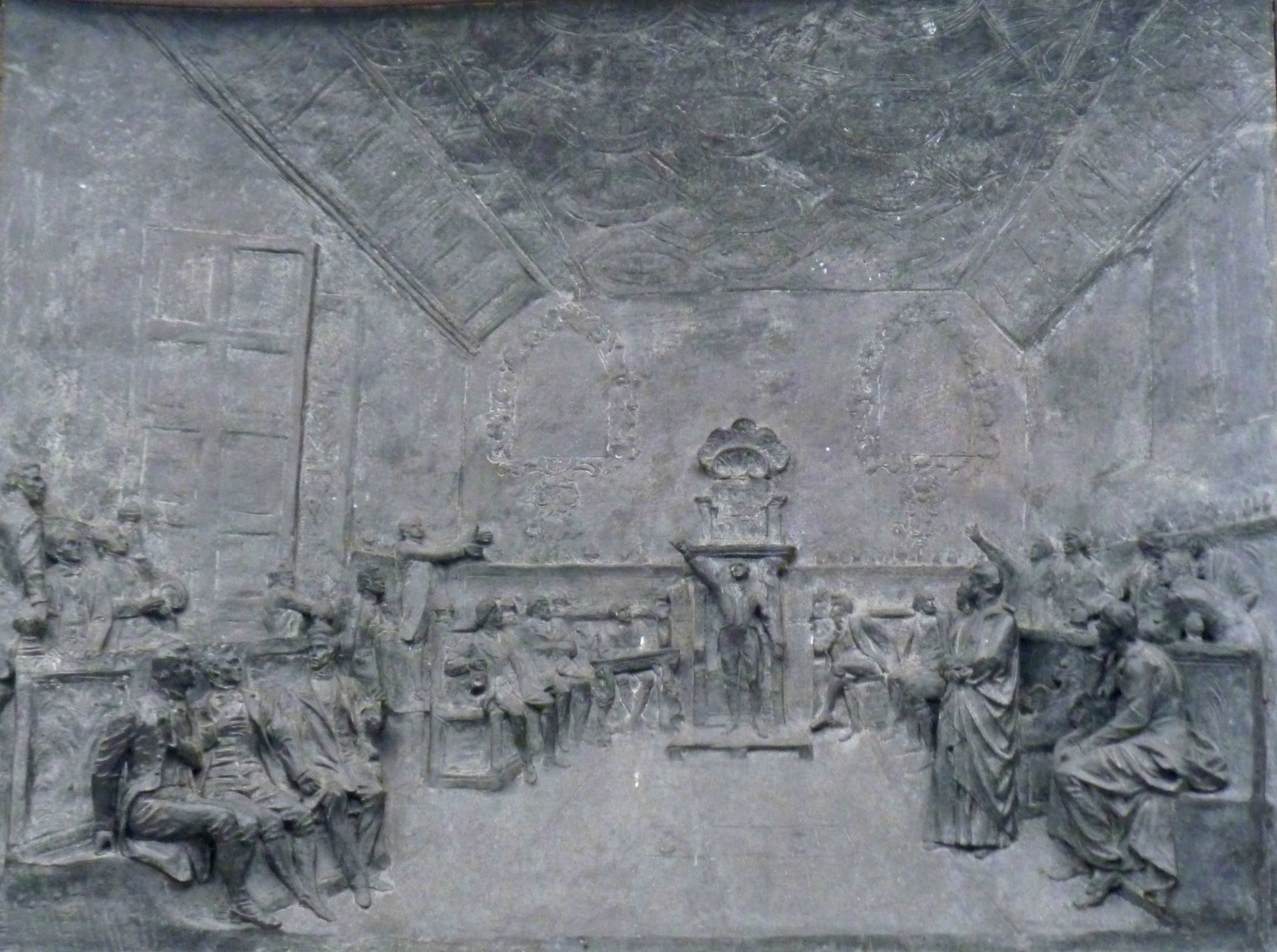 Detalle de la palaca con el relieve titulado "Sala capitular", que representa la firma del acta de la independencia de Quito del poder napoleónico en España, llevada a cabo en una de las salas del convento de San Agustín dos días después de haber depuesto al entonces representante hispano en la Real Audiencia. Ubicado en la base del Monumento de la Independencia, de la Plaza Grande de Quito DM (Ecuador).